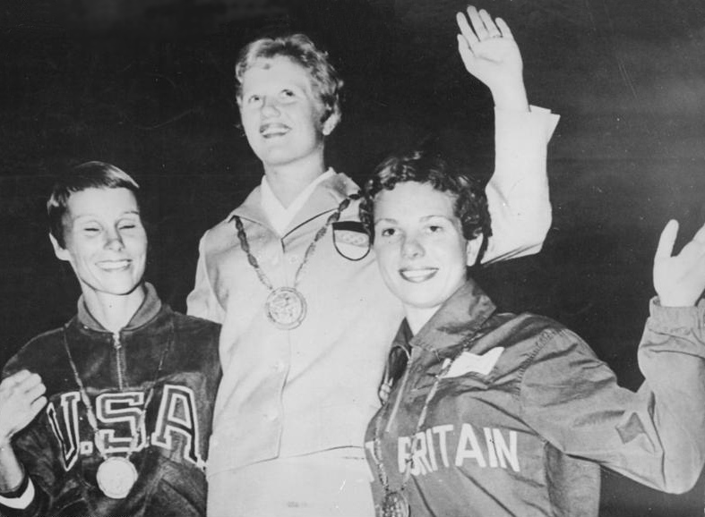 Zentralbild-25 Sd-Fr 30.8.1960 XVII. Olympische Sommerspiele 1960 in Rom (Kunstspringen der Damen) Siegerehrung im Kunstspringen der Damen am 27.8.1960 in Rom. Silbermedaillengewinnerin Paula Pope (USA), Goldmedaillengewinnerin Ingrid Krämer (DDR) und Bronzemedaillengewinnerin Elisabeth Ferris (Großbritannien).